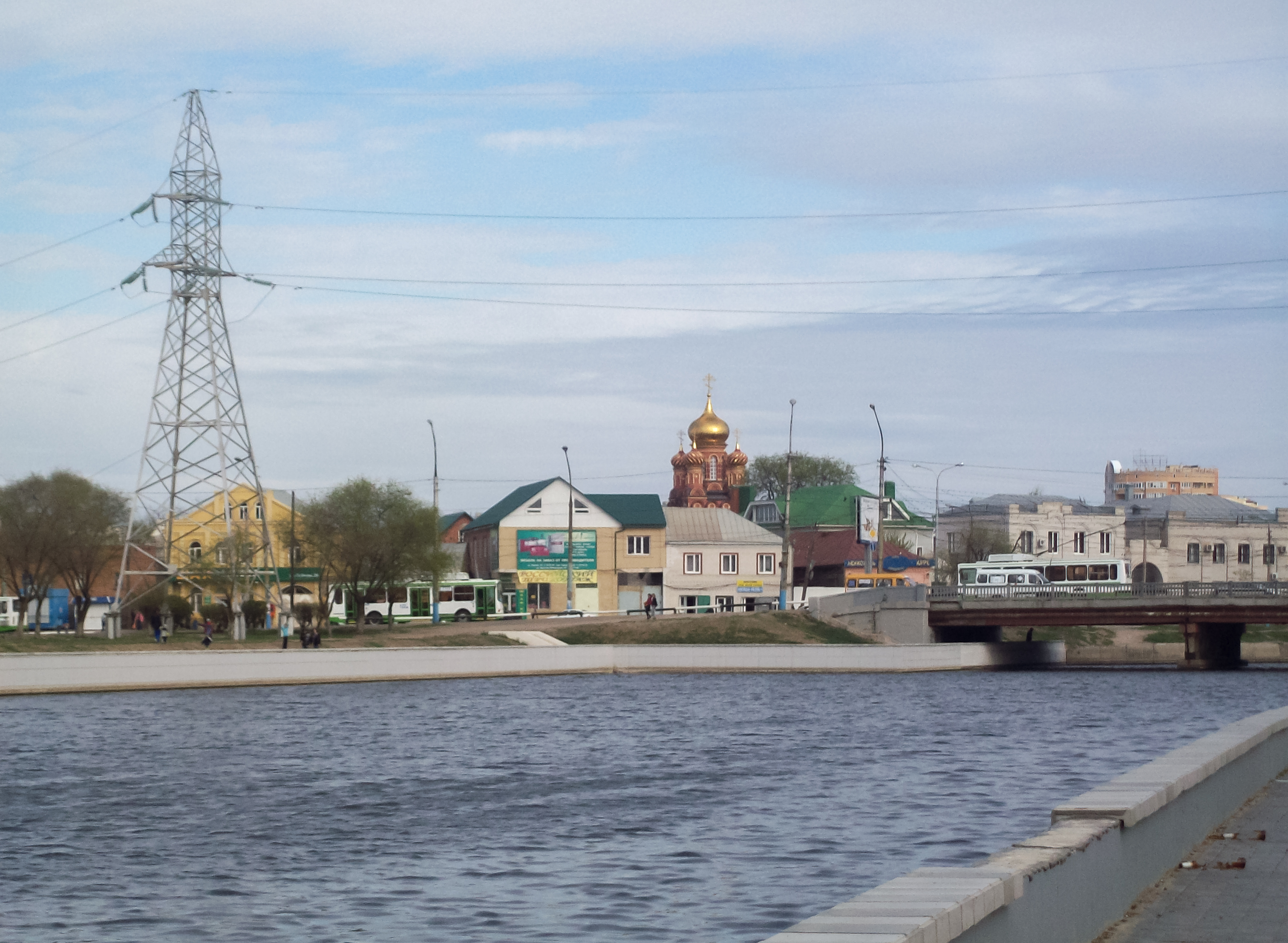 Вид с набережной на храм Иоанно-Предтеченского монастыря (Астрахань)